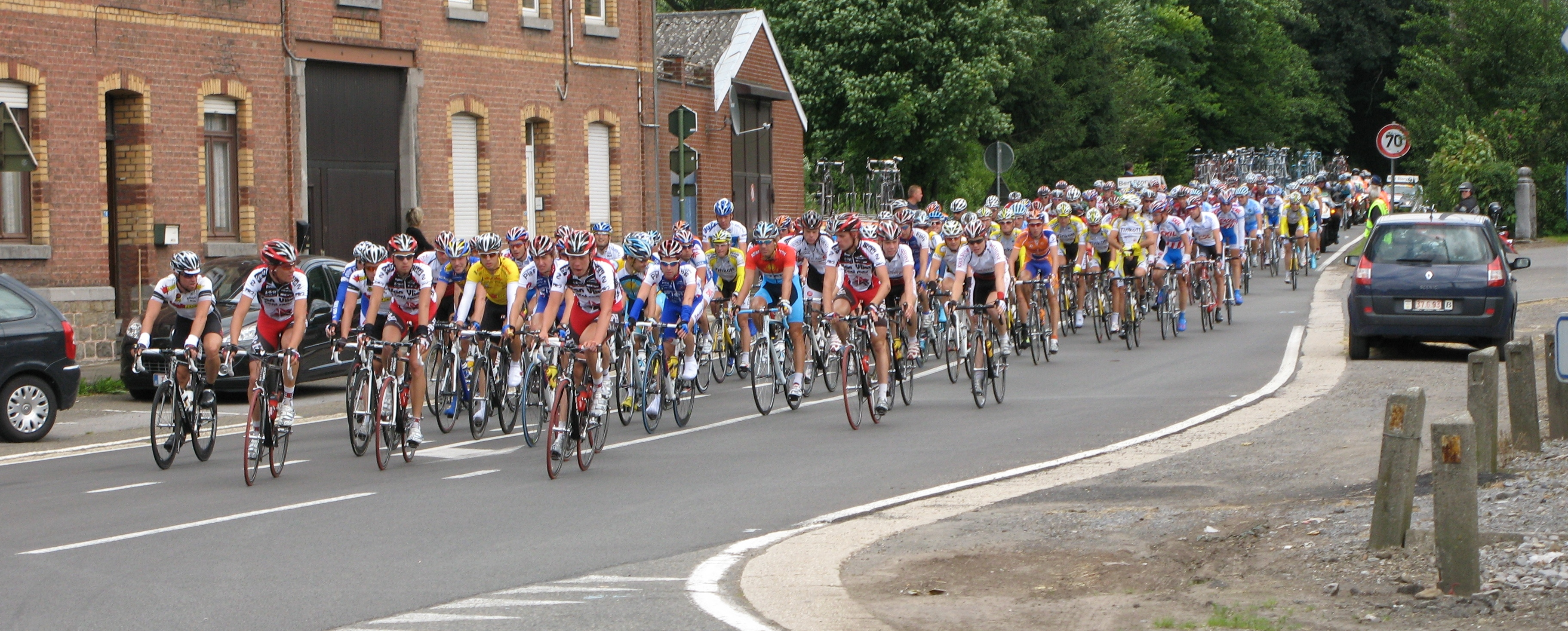 De Plotto bei der Ster Elektrotoer 2008 zu Baelen. Kategorie:Vëlossportler